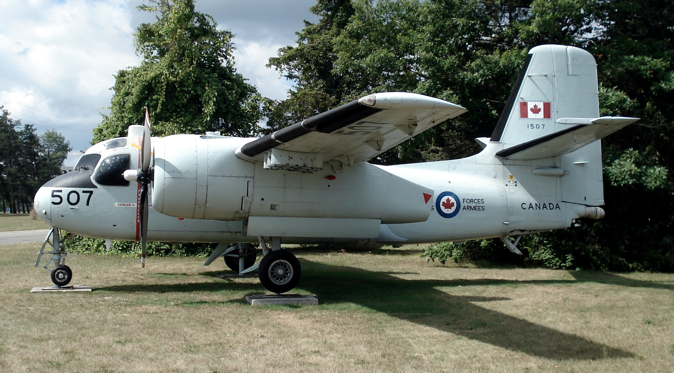 Avión canadiense CS2F-2 en un CFB Borden Canadian-made CS2F-2 Grumman Tracker ASW aircraft. This example is displayed on the grounds of CFB Borden (Base Borden Military Museum). Photo taken on August 18, 2006. Source: Photo by me, User:Balcer.